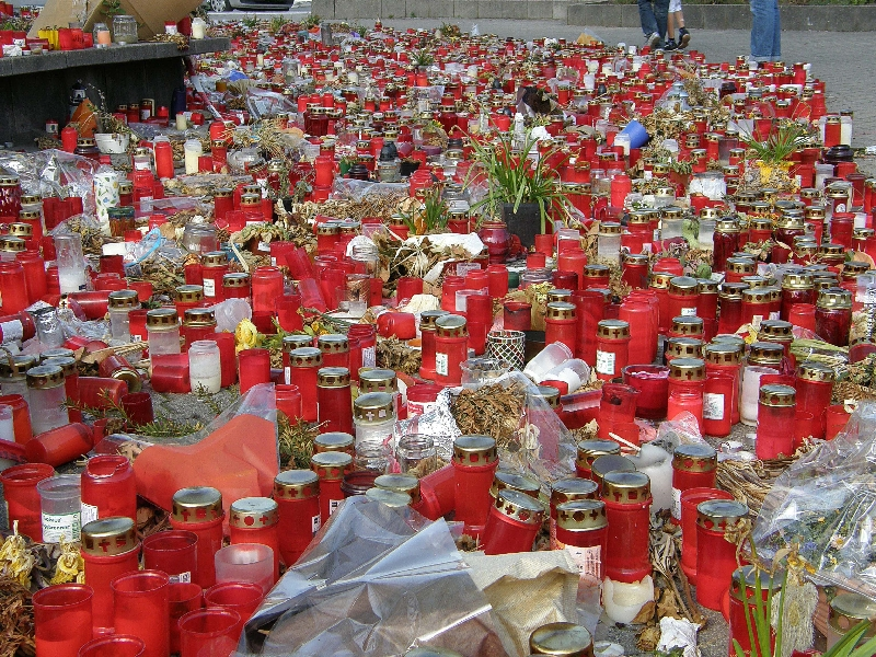 Bilder der Albertville-Realschule aus Winnenden